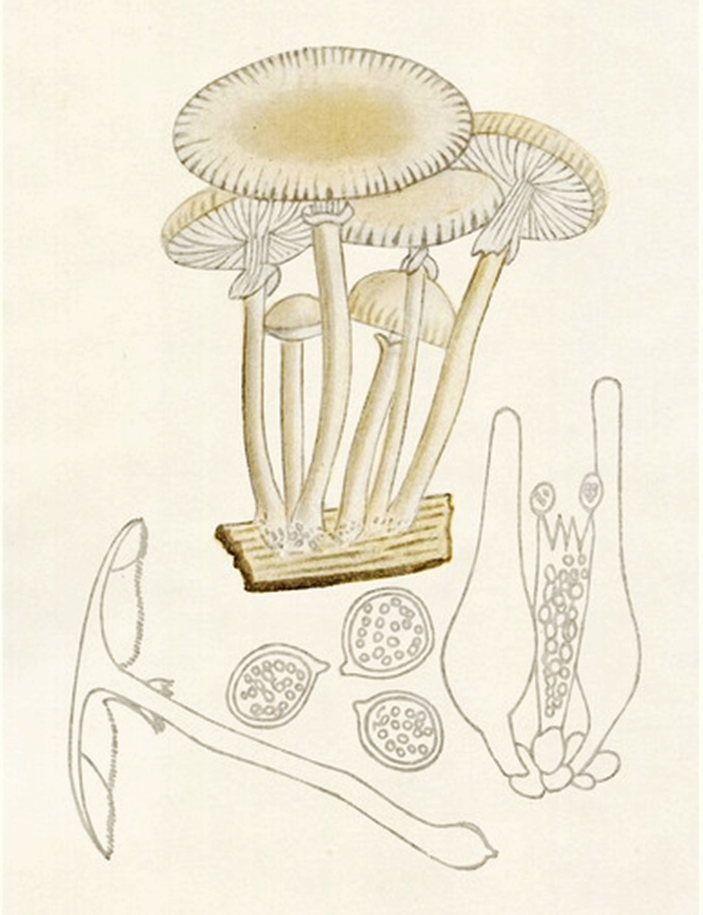 Giacomo Bresadola: Oudemansiella mucida (Schrad., 1794) Hohn. (1910)